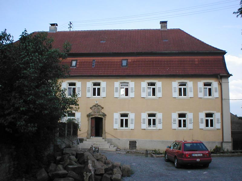 Schloss Ittlingen